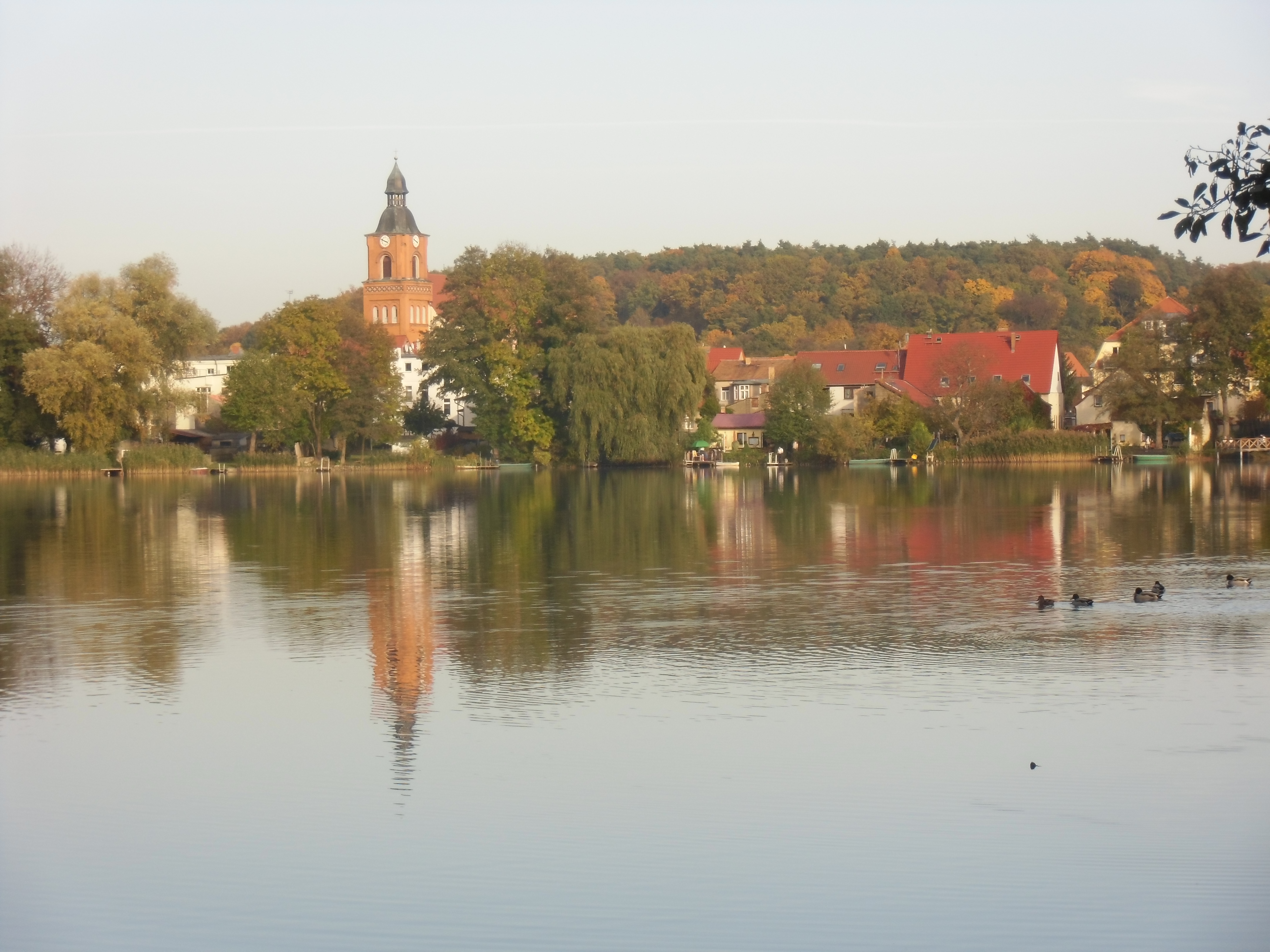 Blick von der Buckowseepromenade auf des Stadtzentrum von 15377 Buckow